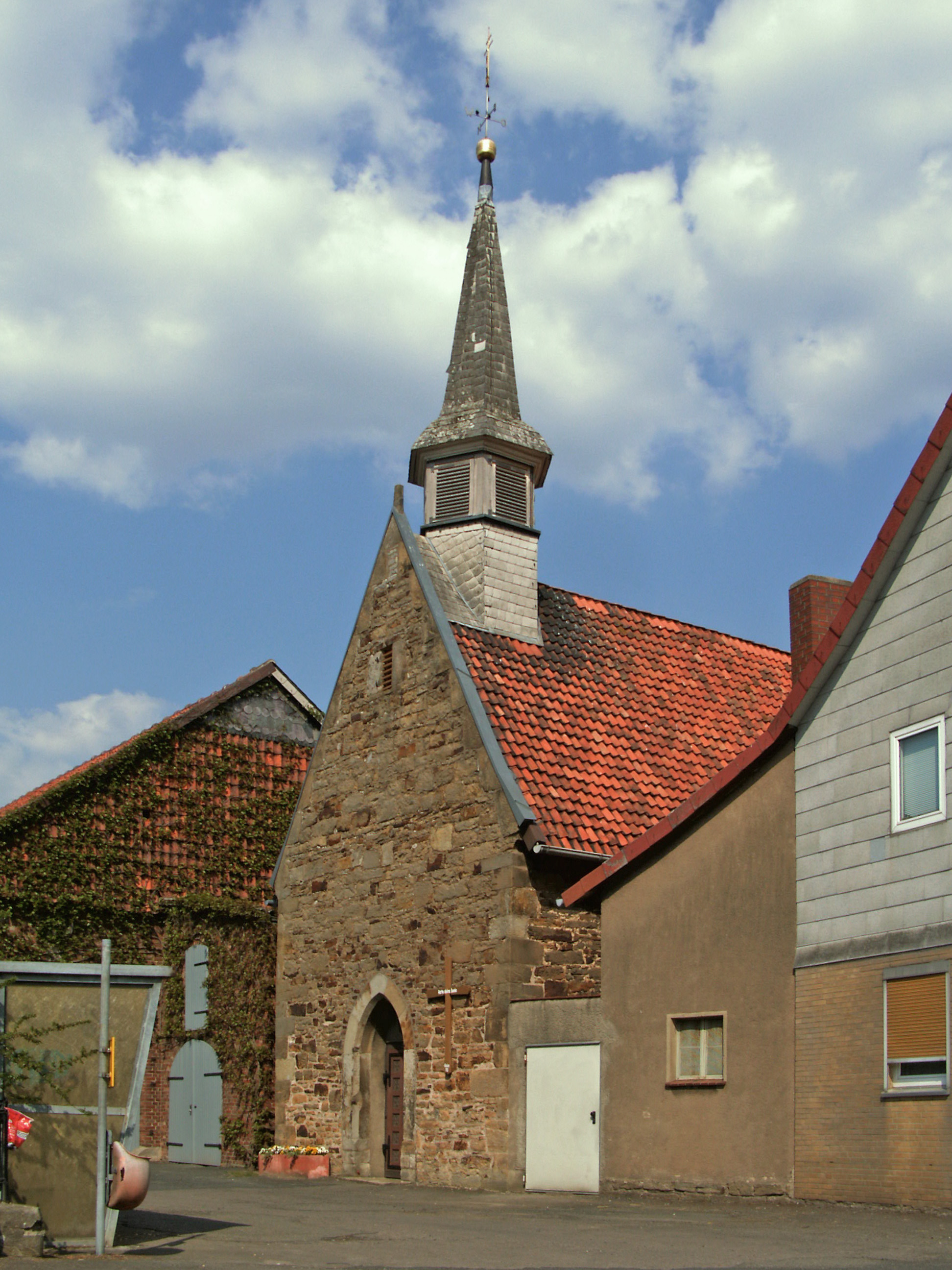 Katholische Kirche St. Bernward in Klein Düngen, Ortsteil von Bad Salzdetfurth